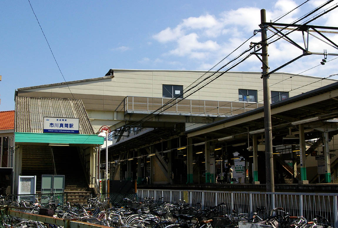 市川真間駅 2005年4月24日投稿者撮影 Category:京成電鉄の画像 Category:鉄道駅画像